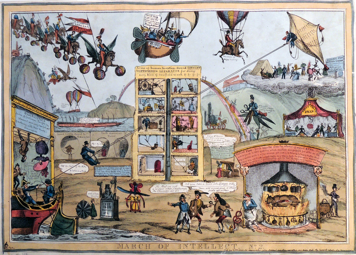 Caricature